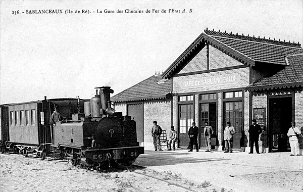 carte postale (de ma collection) du petit train de l'Île de Ré en gare de Sablanceaux